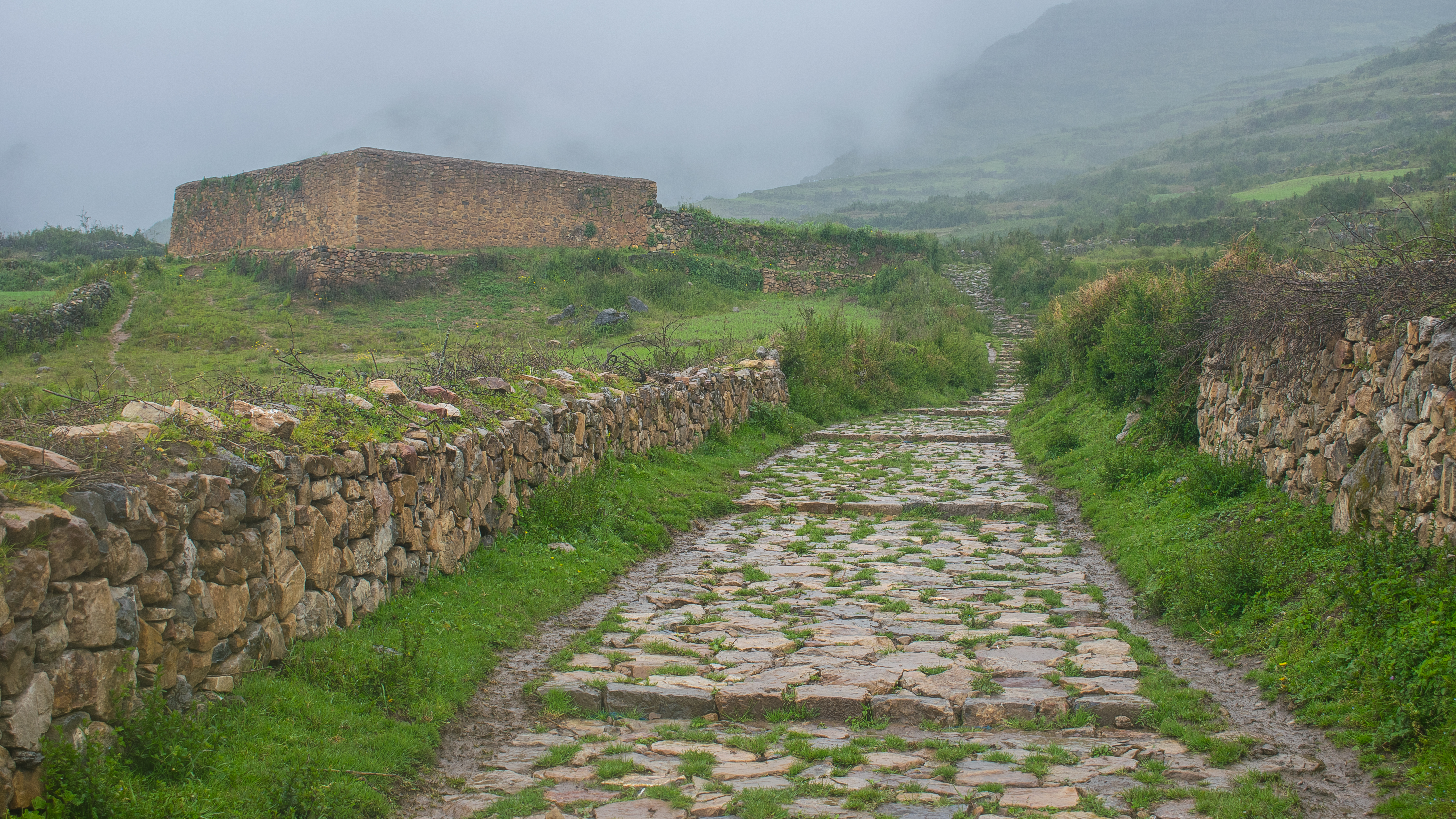 Inca Naani (Camino Inca) y Ushnu de Soledad de Tambo forman parte un complejo y variado paisaje cultural ubicado en el distrito de Huachis, provincia de Huari, departamento de Ancash. Las investigaciones en la zona se desarrollaron en el marco del Proyecto Qhapaq Ñan Tramo Huanuco Pampa - Huamachuco.